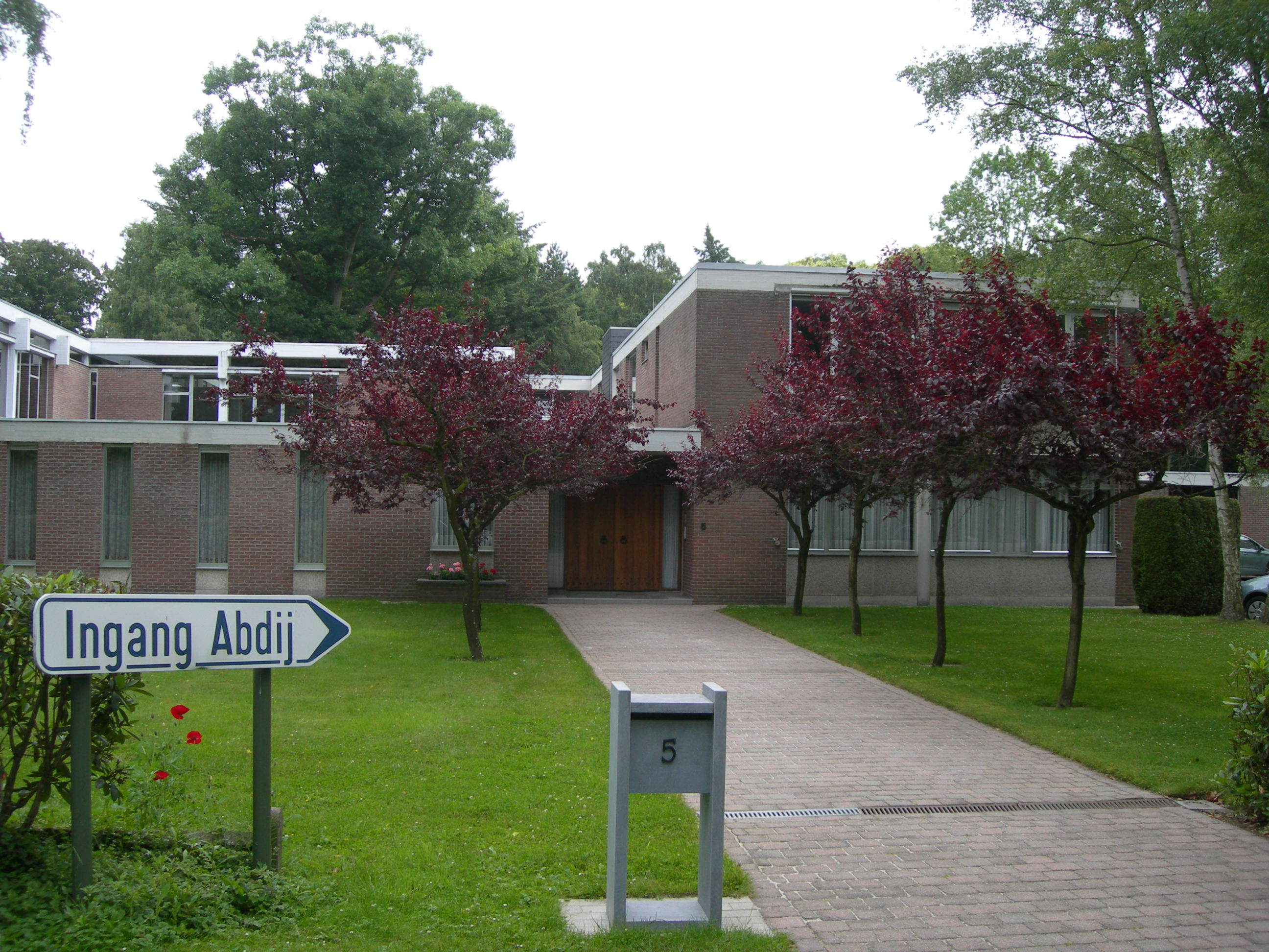 De priorij van Betlehem te Bonheiden, Zellaerdreef 5, 2820 Bonheiden